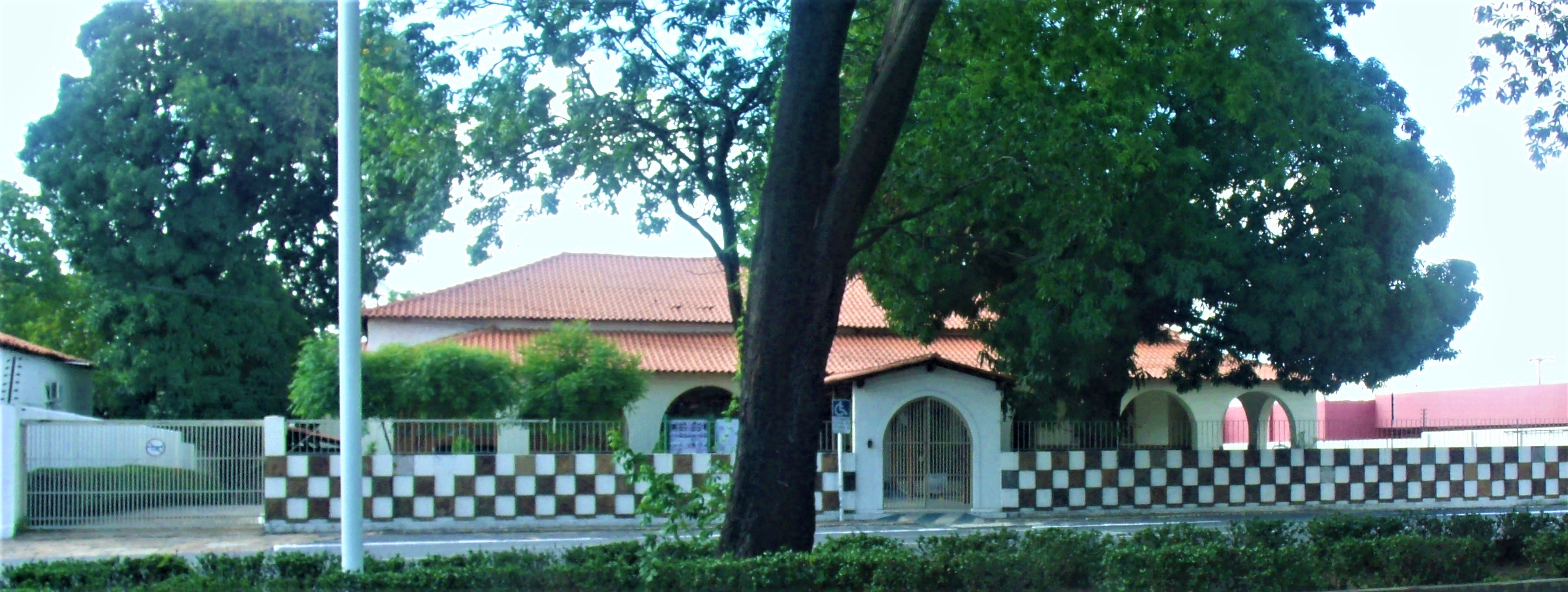 Palacete onde já funcionou o Departamento Nacional de Estradas de Ferro, na Avenida Frei Serafim, em Teresina. Atualmente é o hotel de trânsito de oficias no 25 BC.